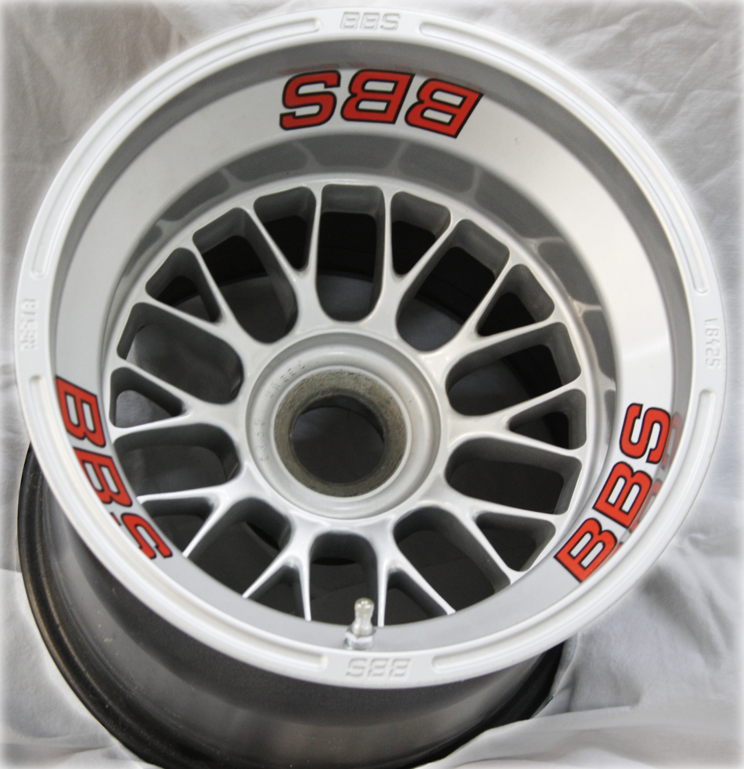 BBS-Ferrari-Formel-1-Magnesium-Felge